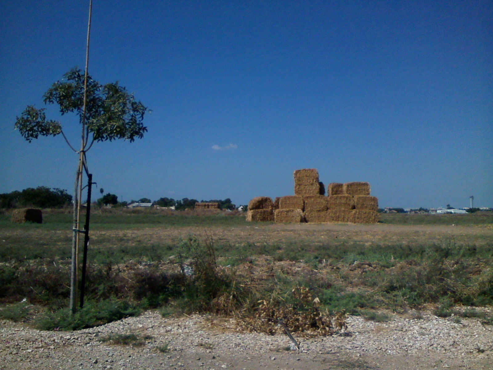 חציר בערימת באלות ישראל